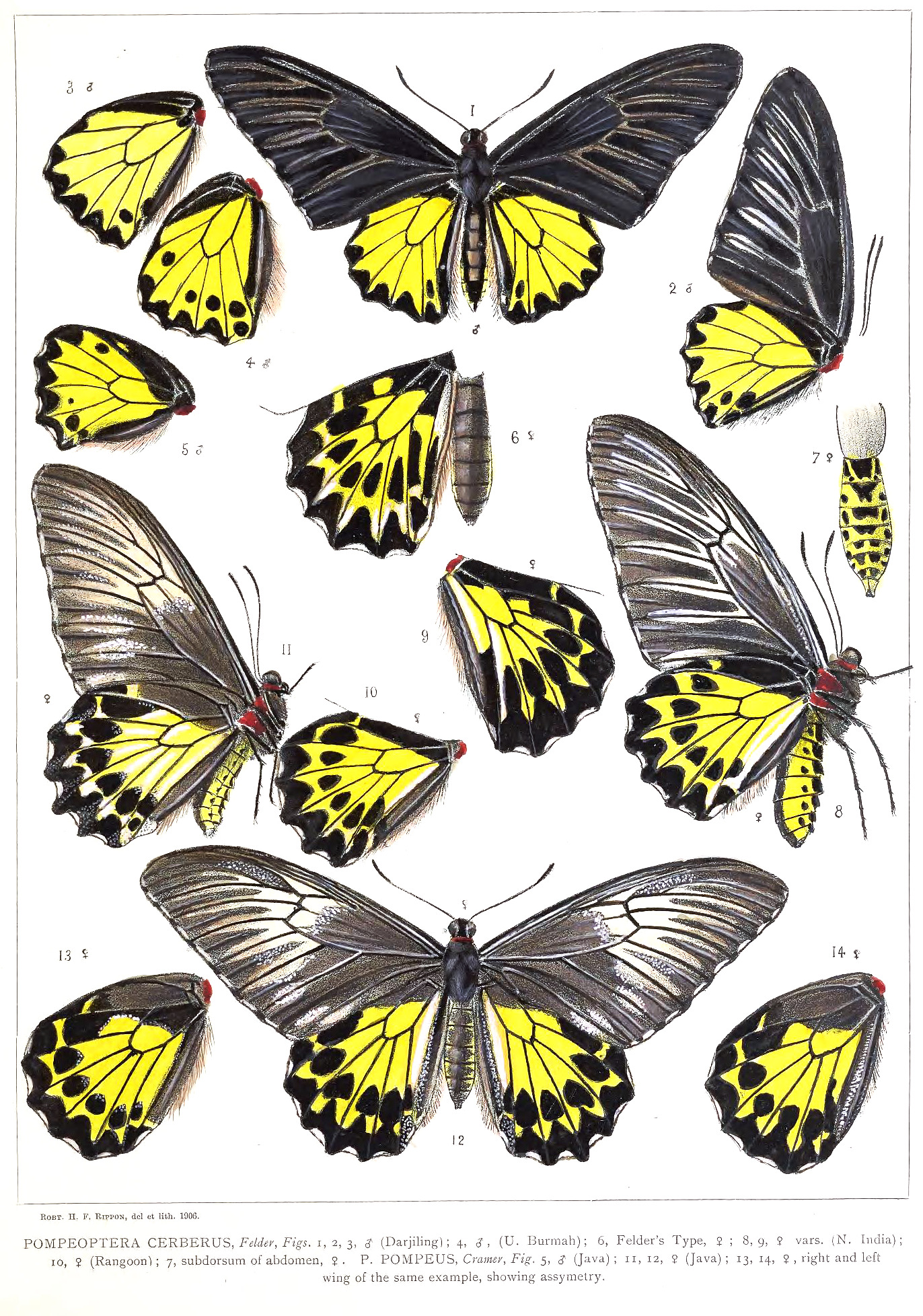 Pompeoptera cerberus